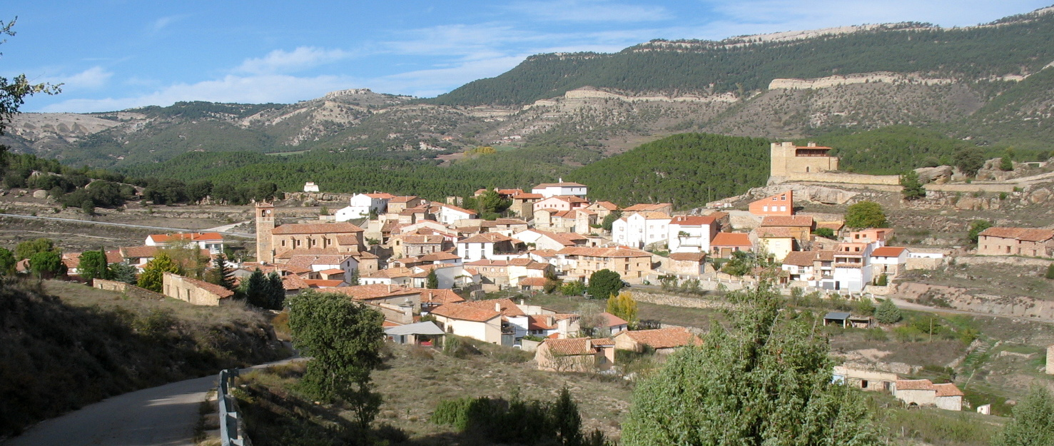 El Castellar (Teruel, España)